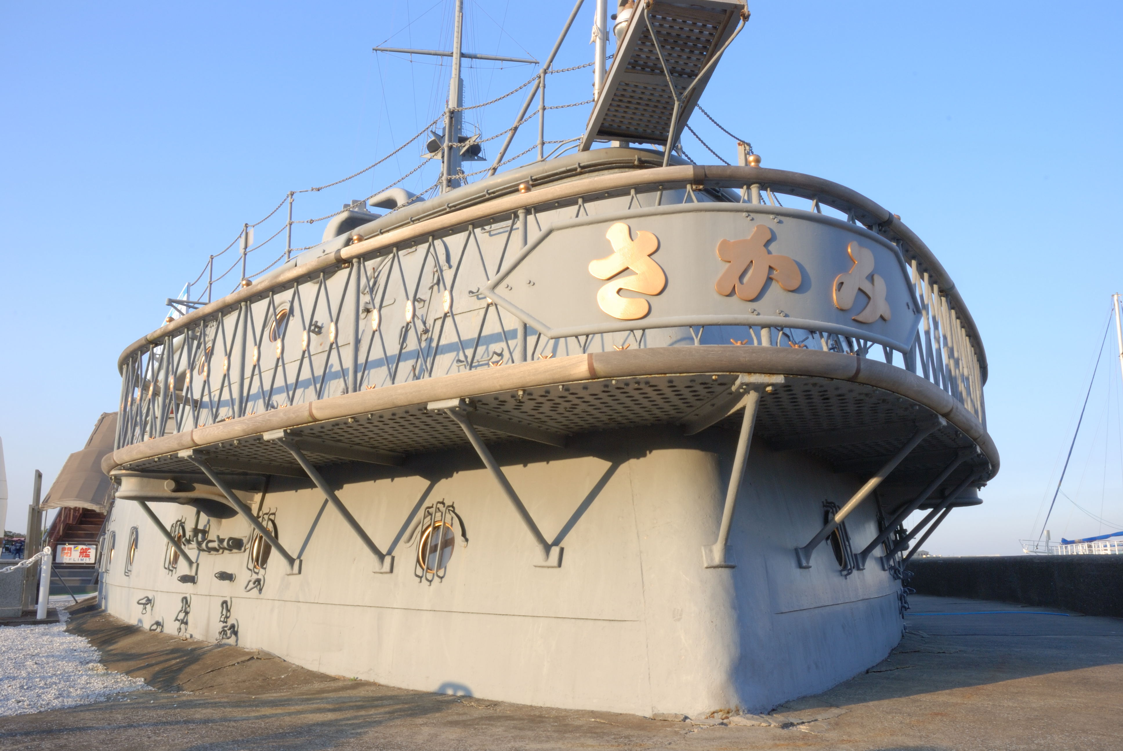 Mikasa stanwalk